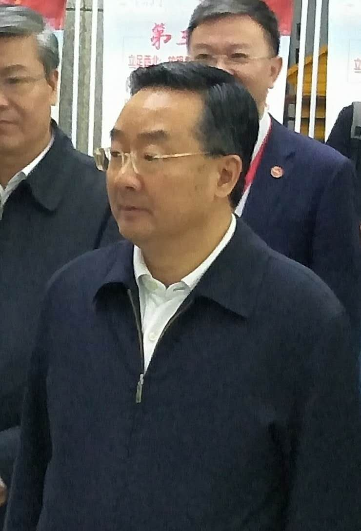 甘肃省省长唐仁健在兰州大学调研，2018年10月19日